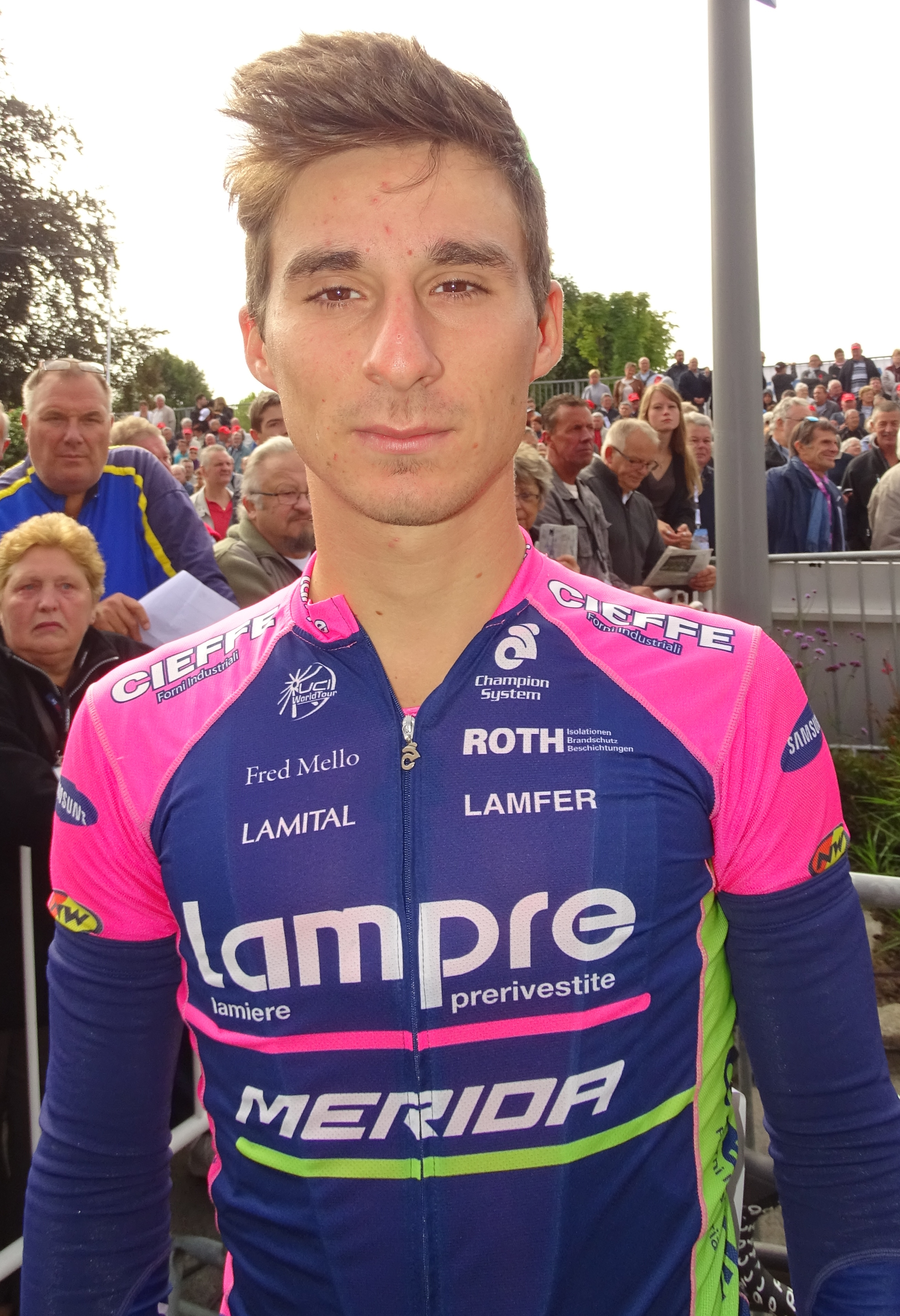 Reportage réalisé le dimanche 6 septembre à l'occasion du départ et de l'arrivée du Grand Prix de Fourmies 2015 à Fourmies, Nord-Pas-de-Calais, France.